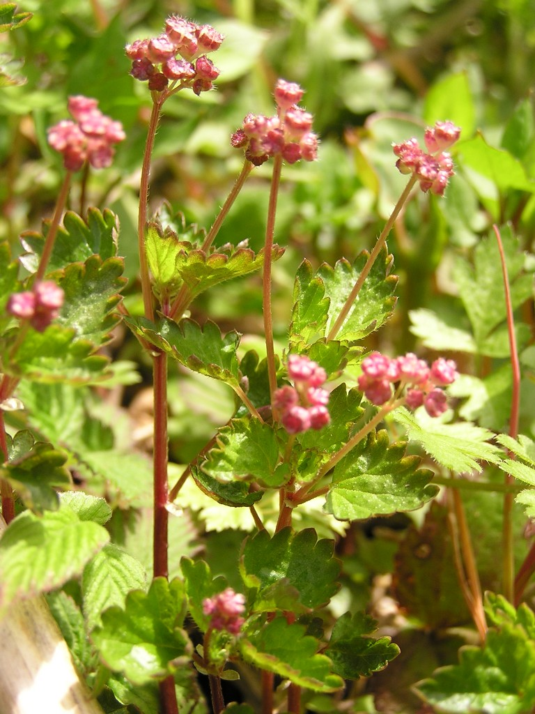 Nanocnide japonica in Sanzen-in near Kyoto.